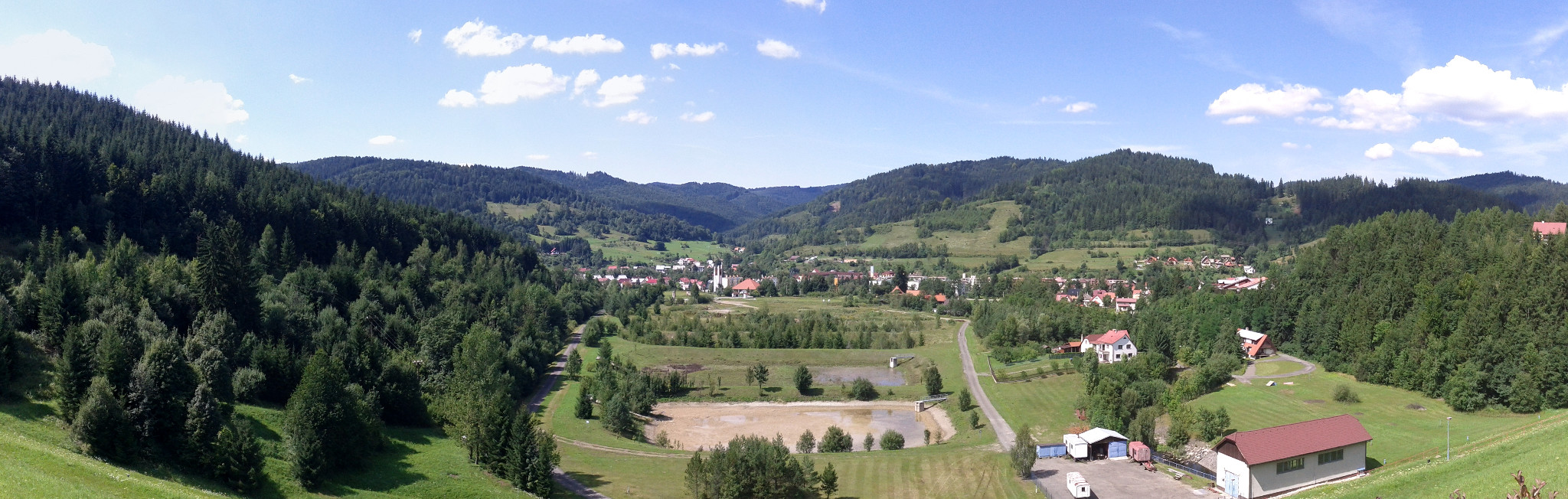 Karolinka, Czech Republic